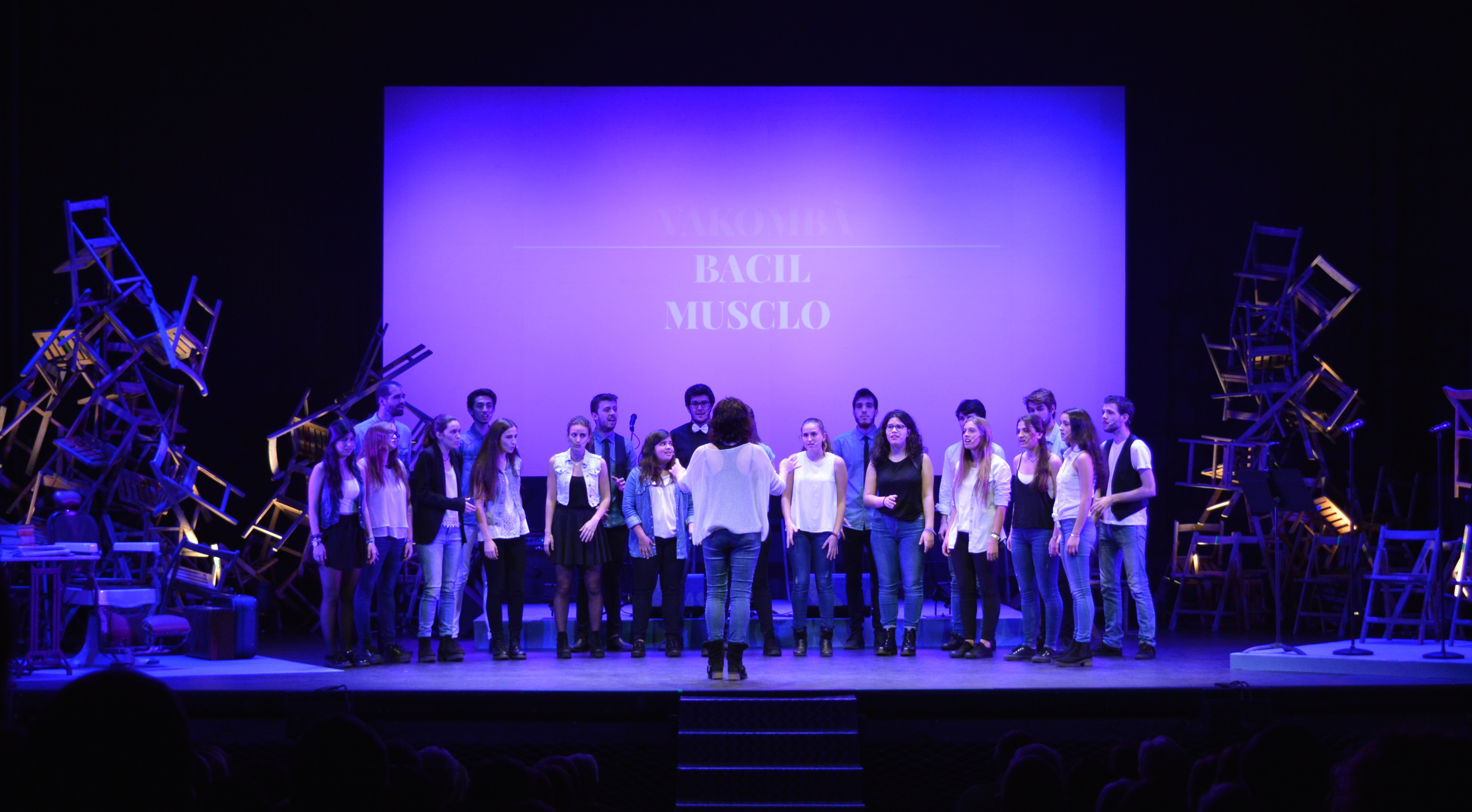 Al capdavall som bàrbars. Homenatge a Joan Oliver realitzat el 30 de novembre de 2016 al Teatre de la Faràndula de Sabadell.